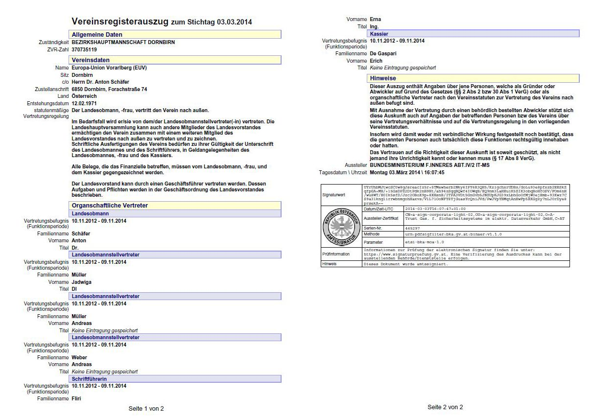 Demo-Auszug aus dem Zentralen Vereinsregister (Österreich) mit Elektronischer Signatur (Verein: EuropaUnion Vorarlberg).